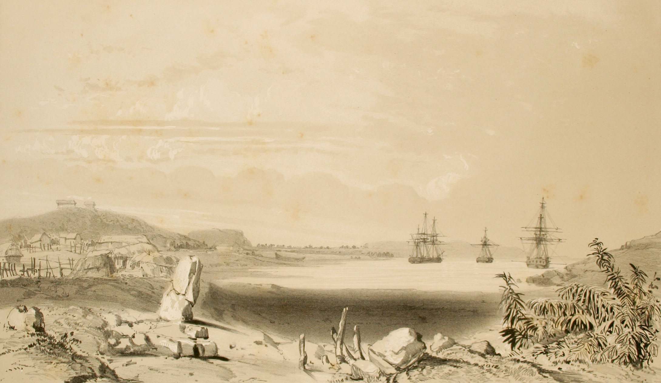 Baie Saint-Vincent. Atlas pittoresque, planche 36 bis (bahia de San Vicente)